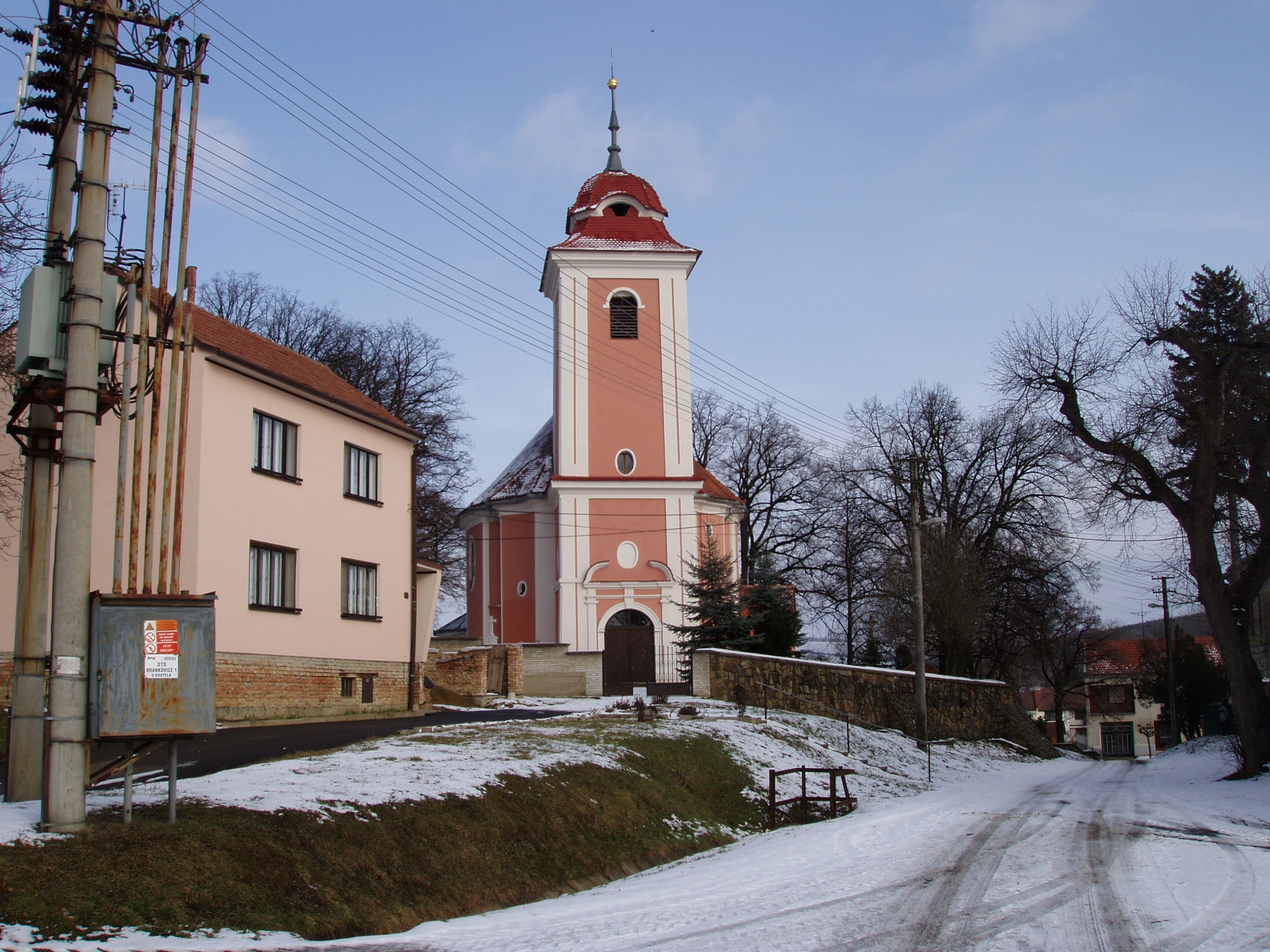 Brankovice